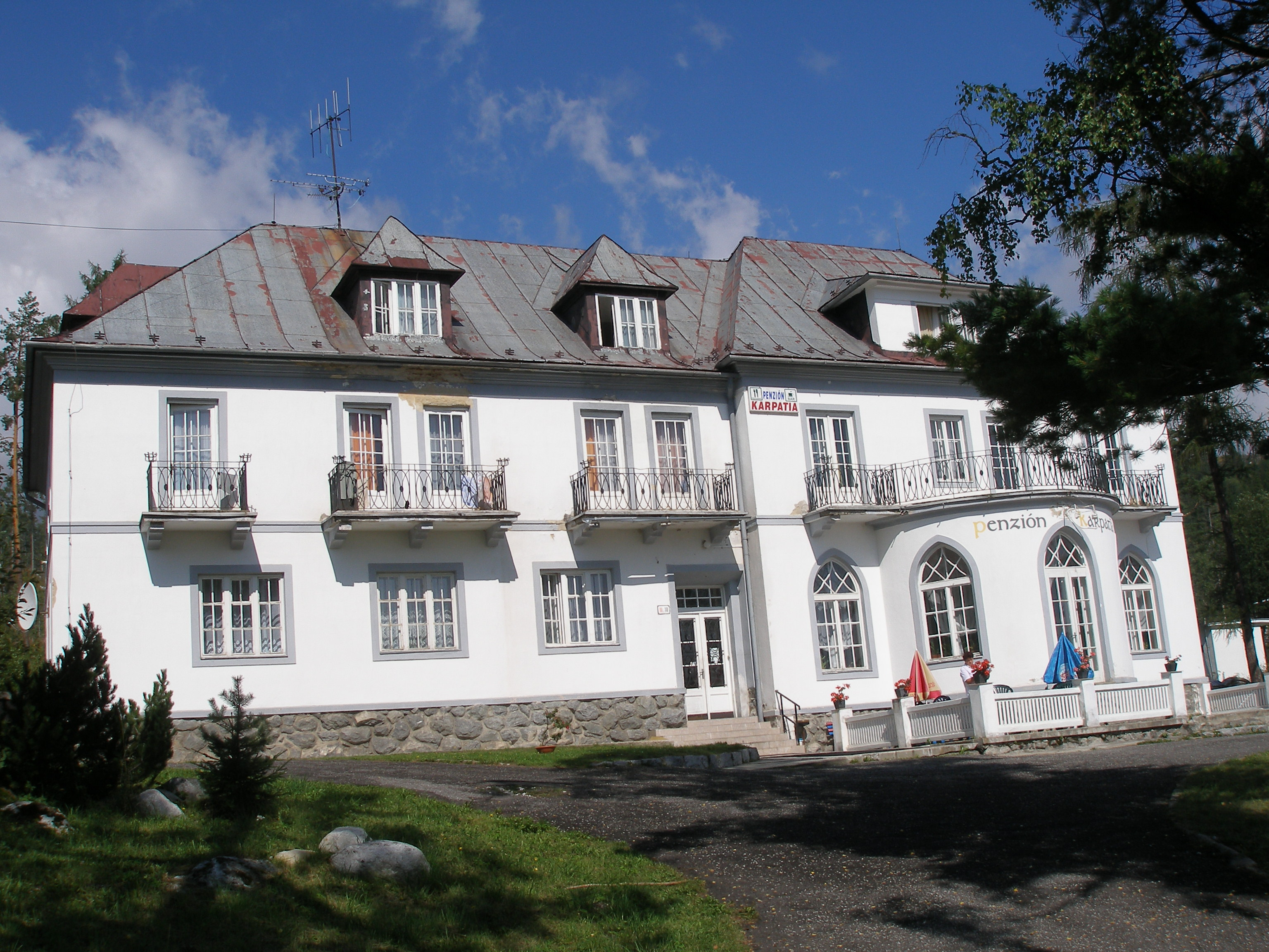 Okolie osady Tatranská Lesná